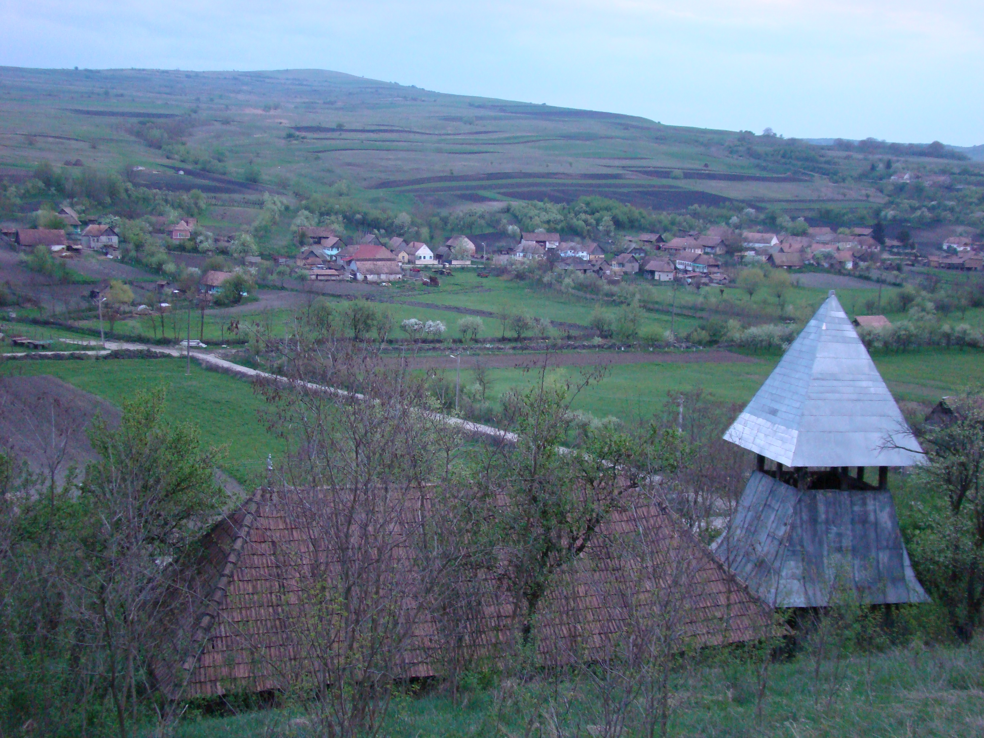 Biserica de lemn din Șilea cu hramul „Sf.Nicolae”